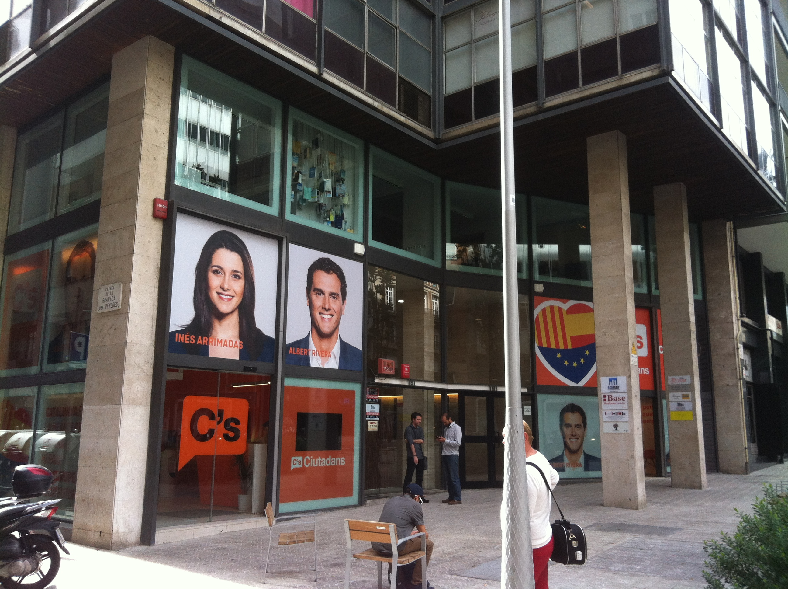 Seu de Ciutadans al carrer Balmes, 191. Any 2015